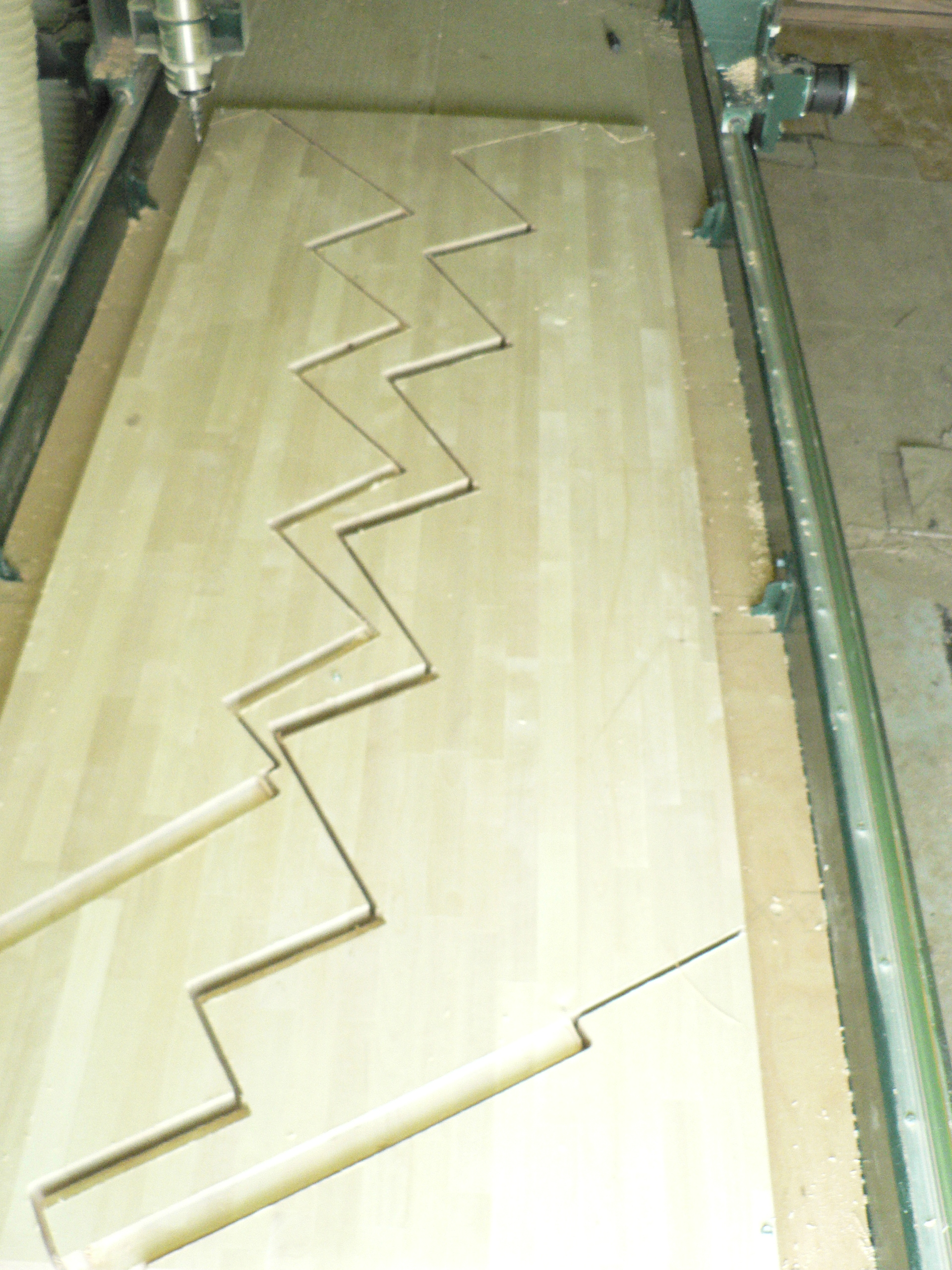 Выпиленные на ЧПУ тетивы с вырезами.